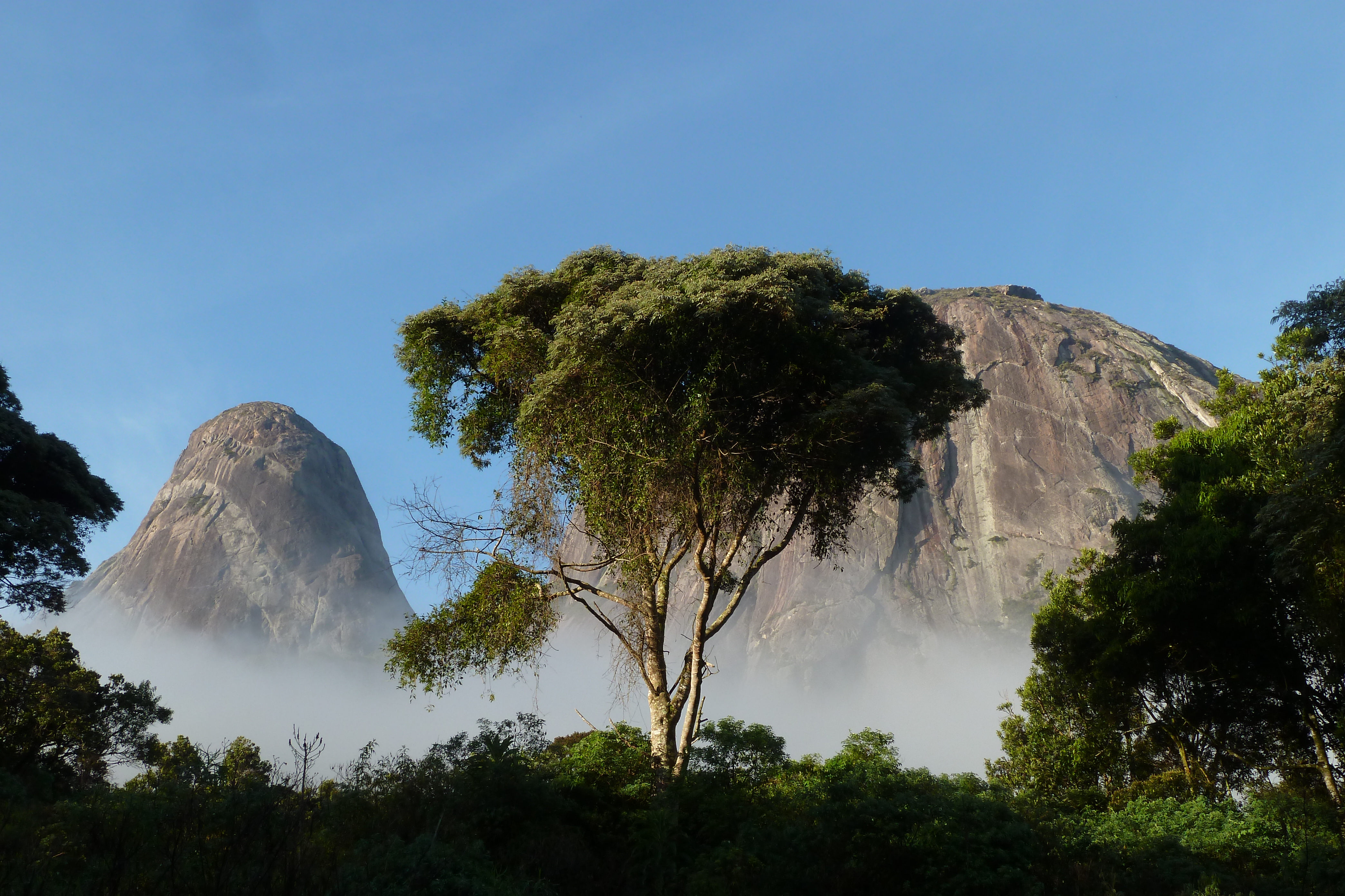 O Parque Estadual dos Três Picos (PETP) localiza-se na Região Serrana do Estado do Rio de Janeiro, no Brasil. O seu nome evoca os Três Picos de Friburgo, imponente conjunto de montanhas graníticas que, elevando-se a de 2.316 metros acima do nível do mar, e é o ponto culminante de toda a Serra do Mar. Com uma área aproximada de 65.113 hectares, é o maior parque estadual do Rio de Janeiro, abrangendo porções dos municípios de Cachoeiras de Macacu, Teresópolis, Nova Friburgo, Silva Jardim, e Guapimirim.